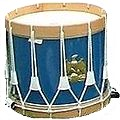 Tambour traditionnel